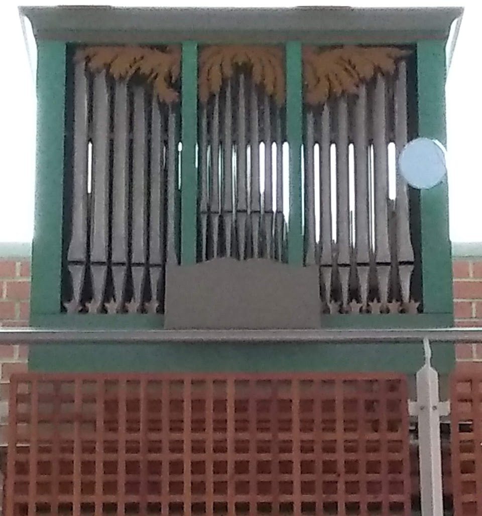 Prospekt der Pinchi-Orgel der Matthäus-Kirche in Bergtheim (Bayern/Deutschland)